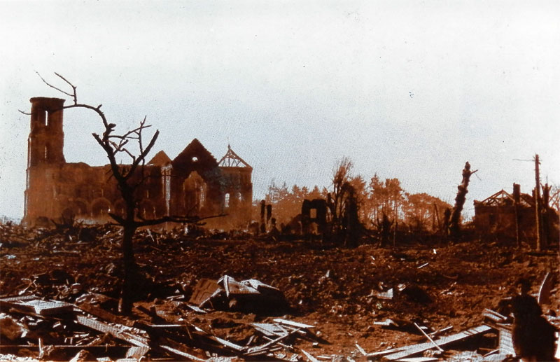 Dismantroù goude bombezadeg, 8 mae 1944